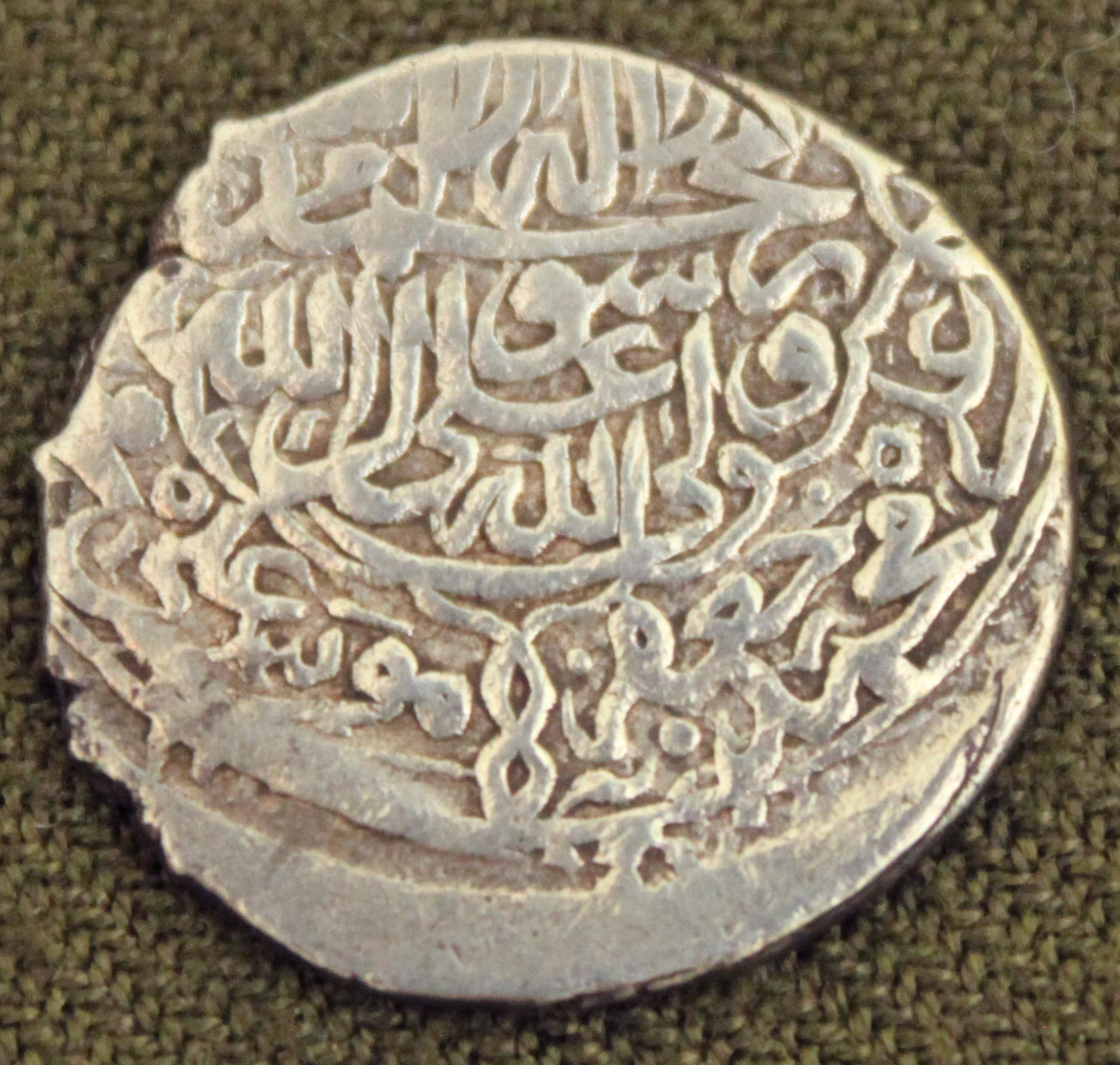 Сефевиды Мухаммед шах Худабенди серебряная монета 1577 год.